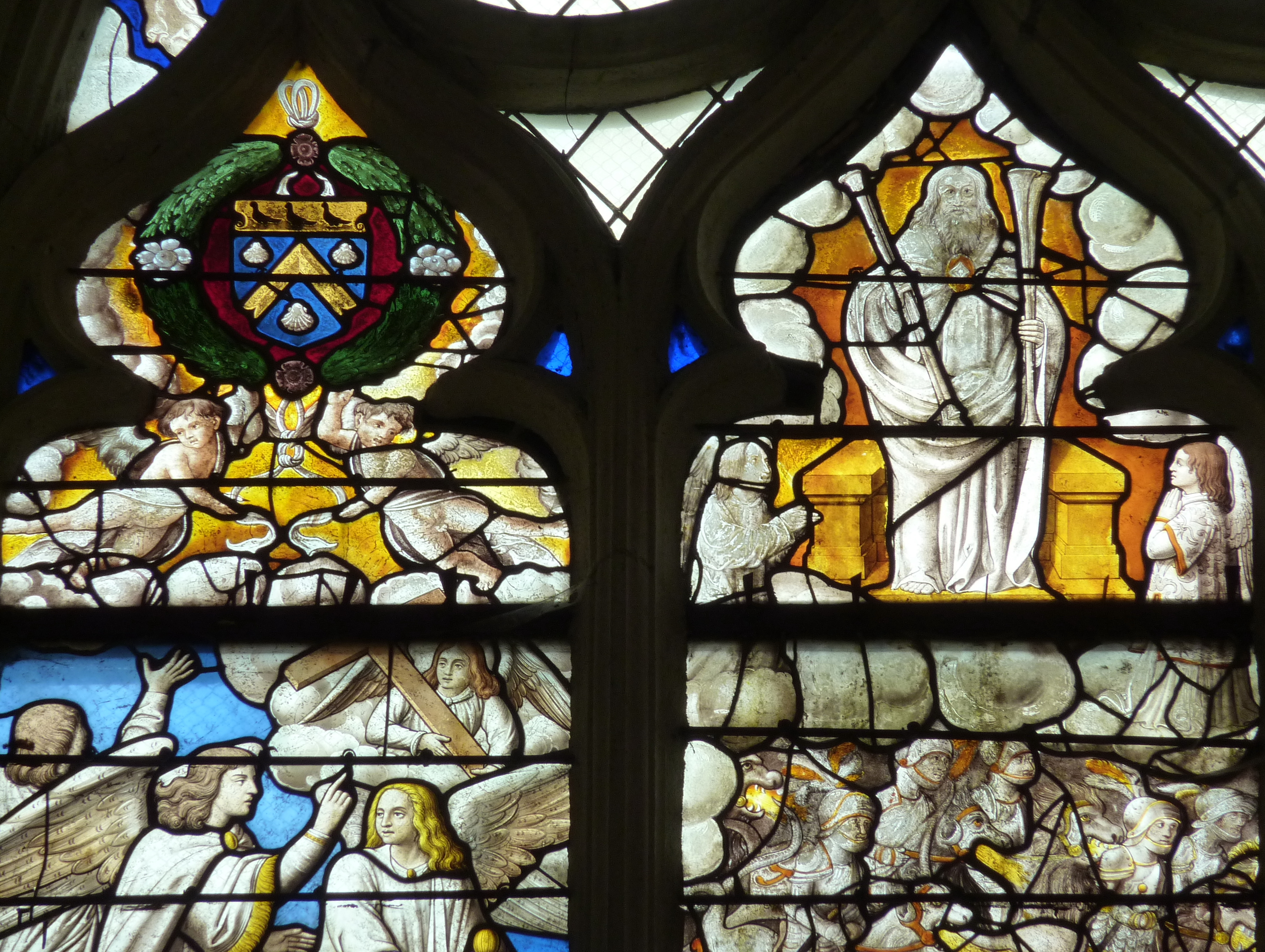 Katholische Kirche Saint-Georges in Chavanges im Département Aube (Champagne-Ardenne/Frankreich), Bleiglasfenster aus dem 16. Jahrhundert, Darstellung: Apokalypse, oberer Ausschnitt mit Wappen.